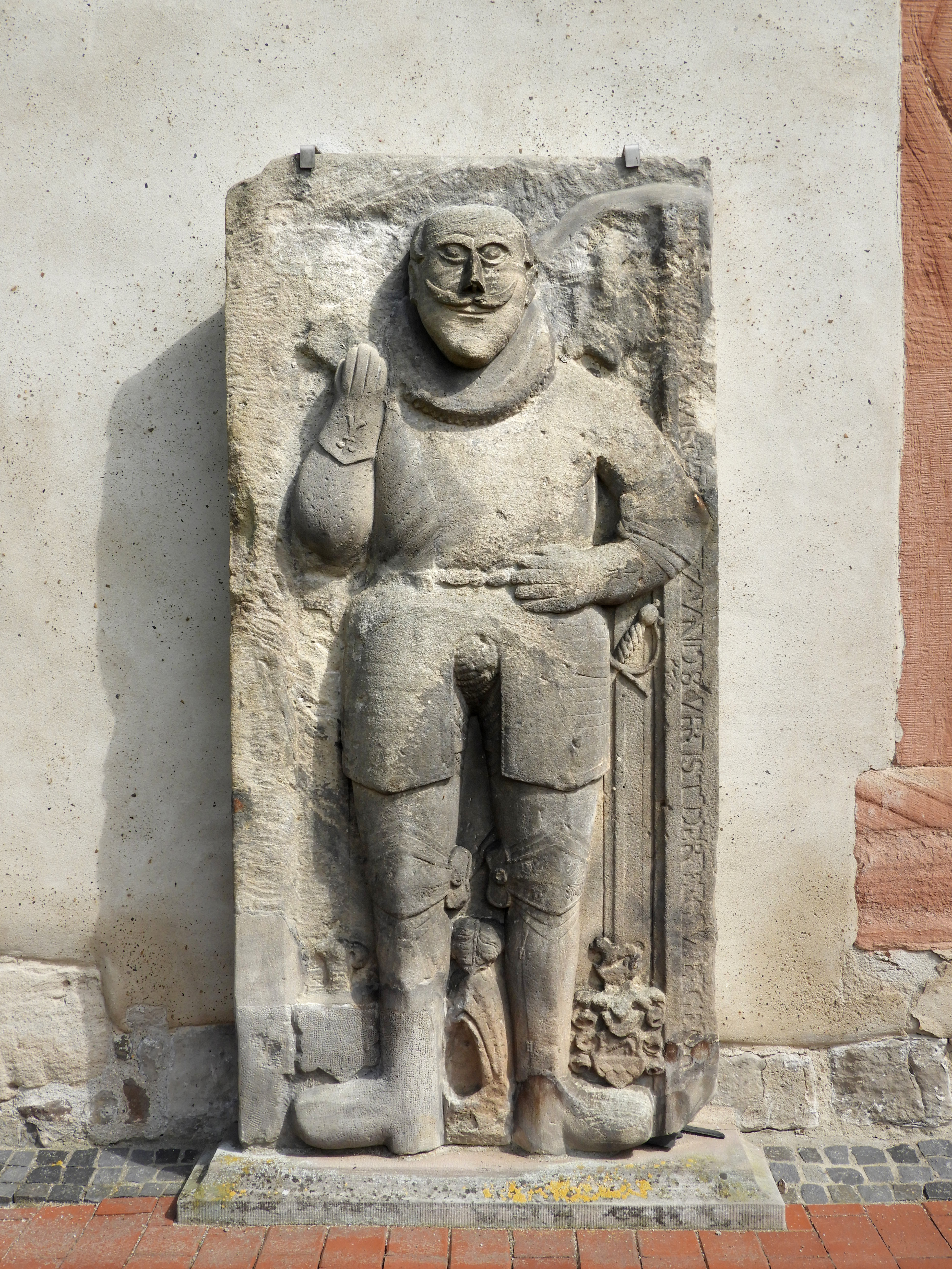 Albungen ist ein Stadtteil von Eschwege. Der an der westlichen Außenwand befestigte Grabstein zeigt eine in Stein gehauene überlebensgroße Figur, die einen von Diede darstellt. Im Ritterkostüm seiner Zeit mit spanischem Kragen und hochgezwirbeltem Schnurrbart.